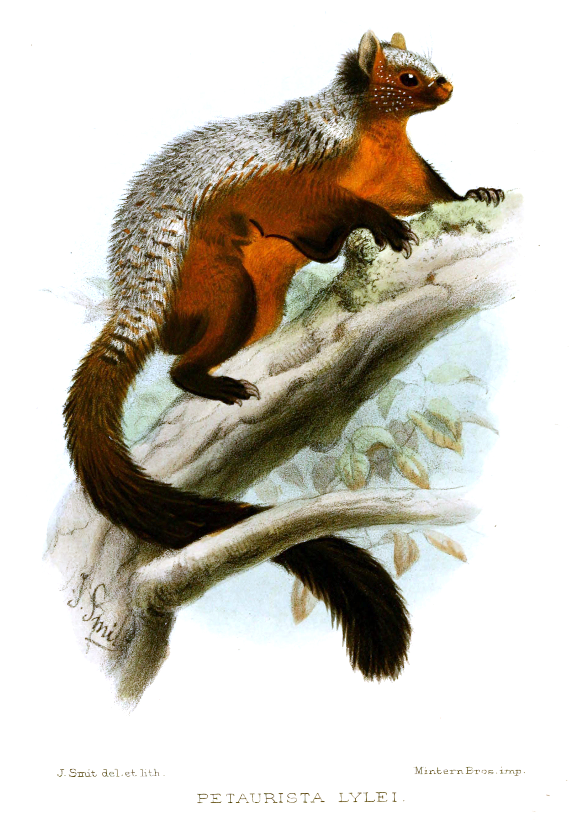 Petaurista philippensis lylei